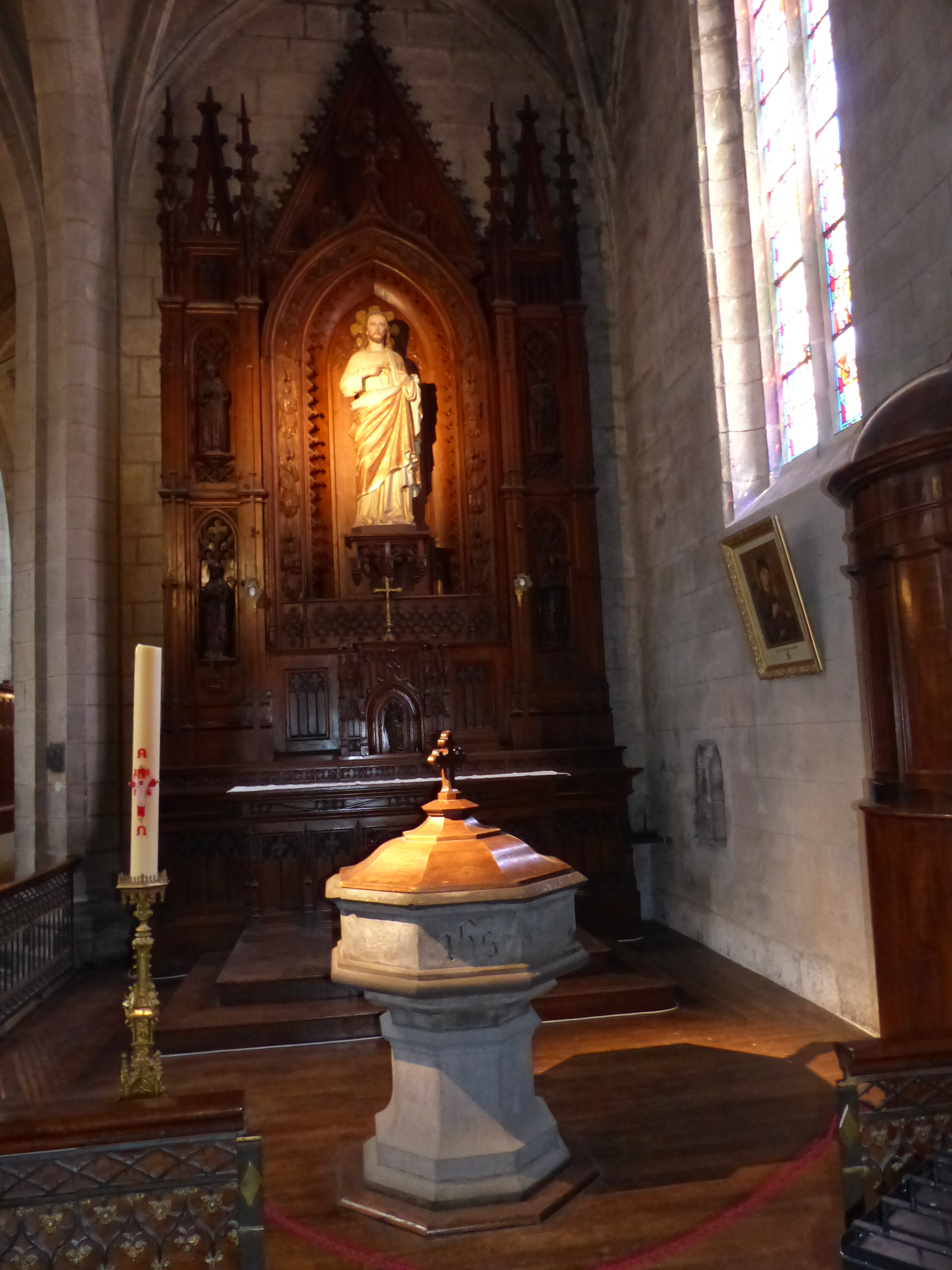 Cathédrale